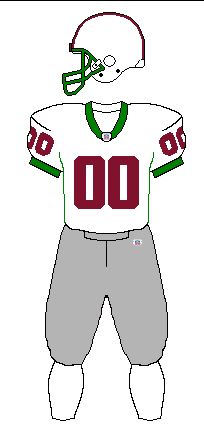 Uniforme da equipe de futebol americano Fluminiense Imperadores